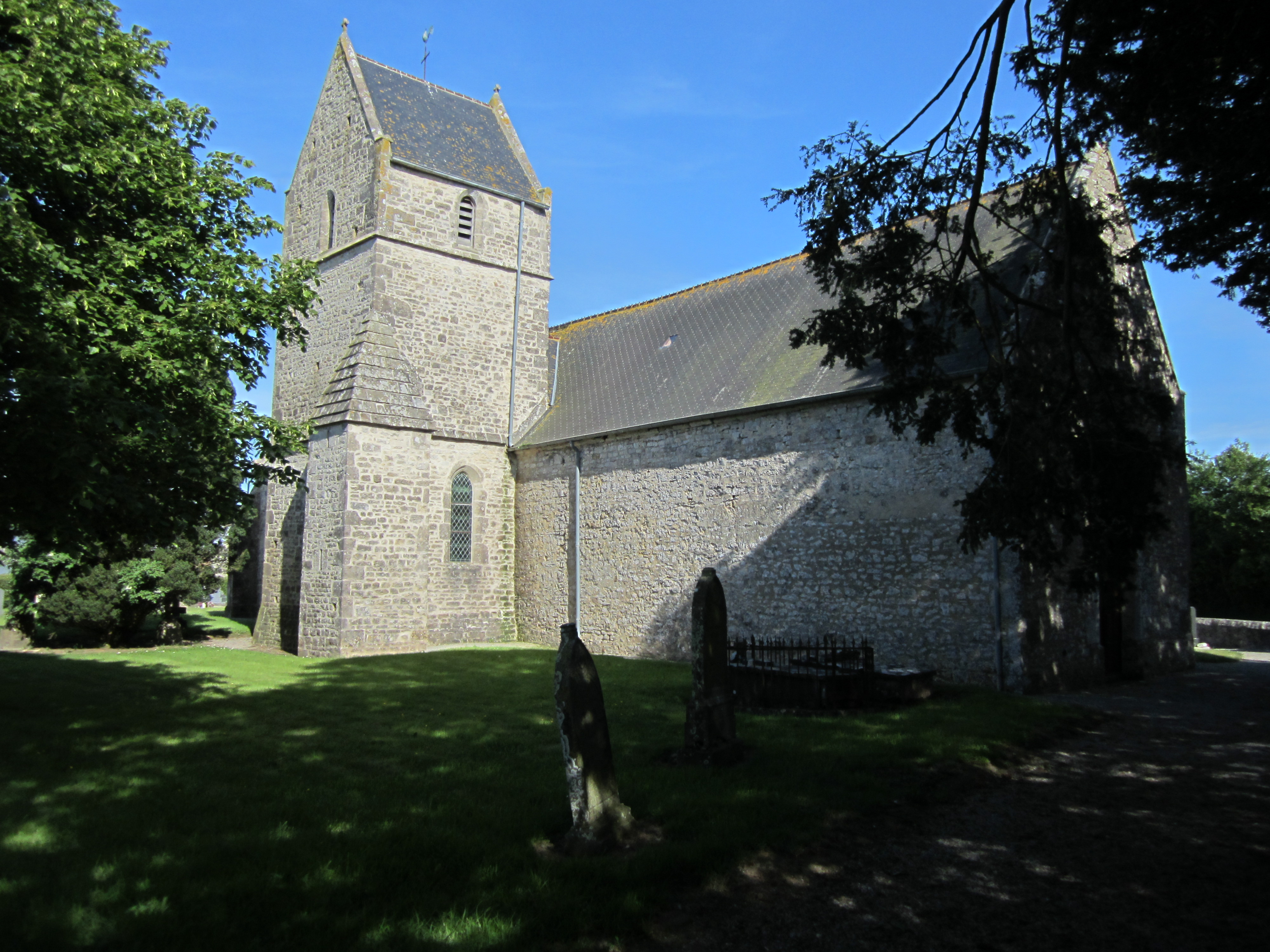 Église Saint-Pierre de Biniville